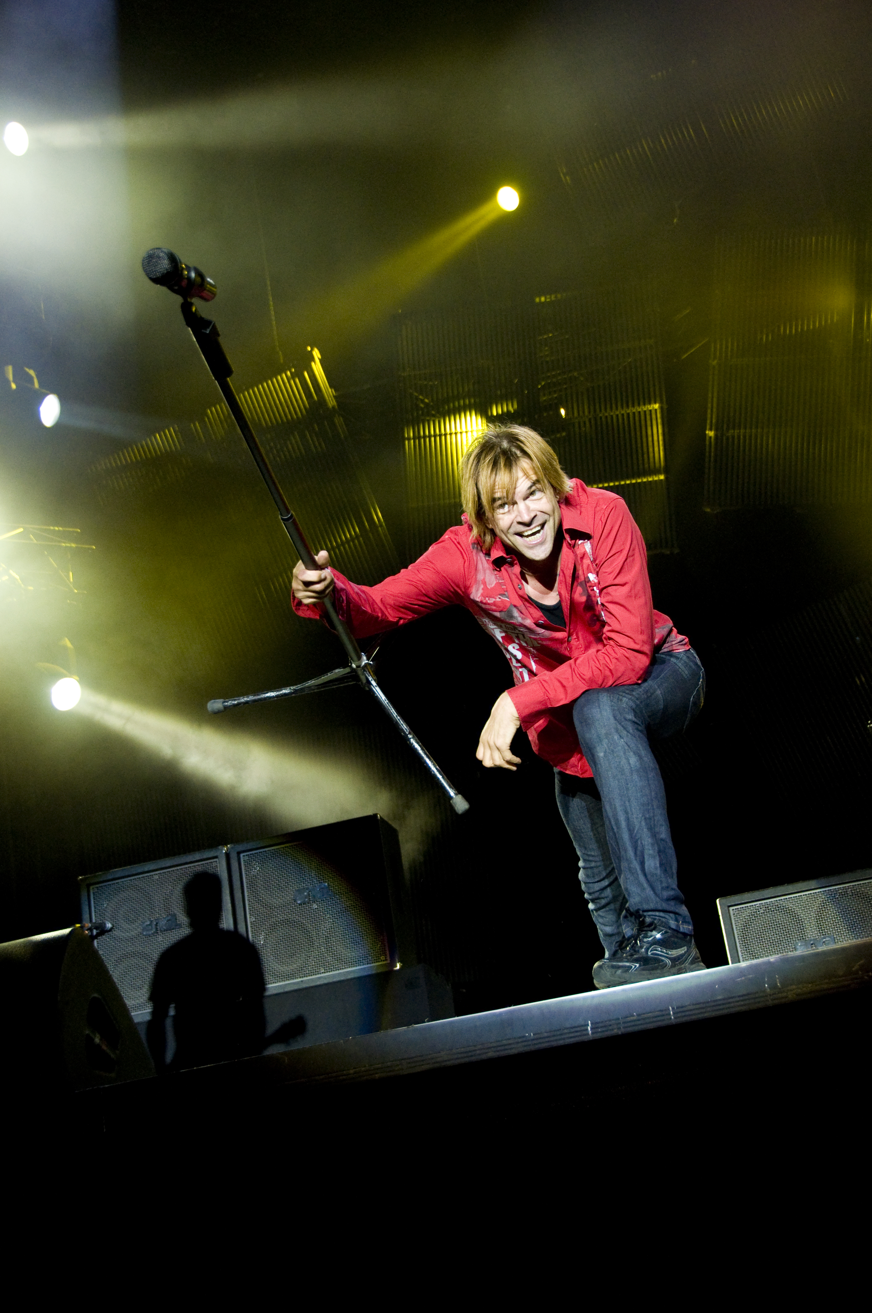 Die Bühne betraten die Toten Hosen kurz nach 21 Uhr. Die Punk-Veteranen spielten ihre grossen Hits, darunter natürlich «Alles aus Liebe», «Hier kommt Alex» und «Paradies». Feierabend machten die Düsseldorfer nach rund zwei Stunden. Das Publikum war glücklich.